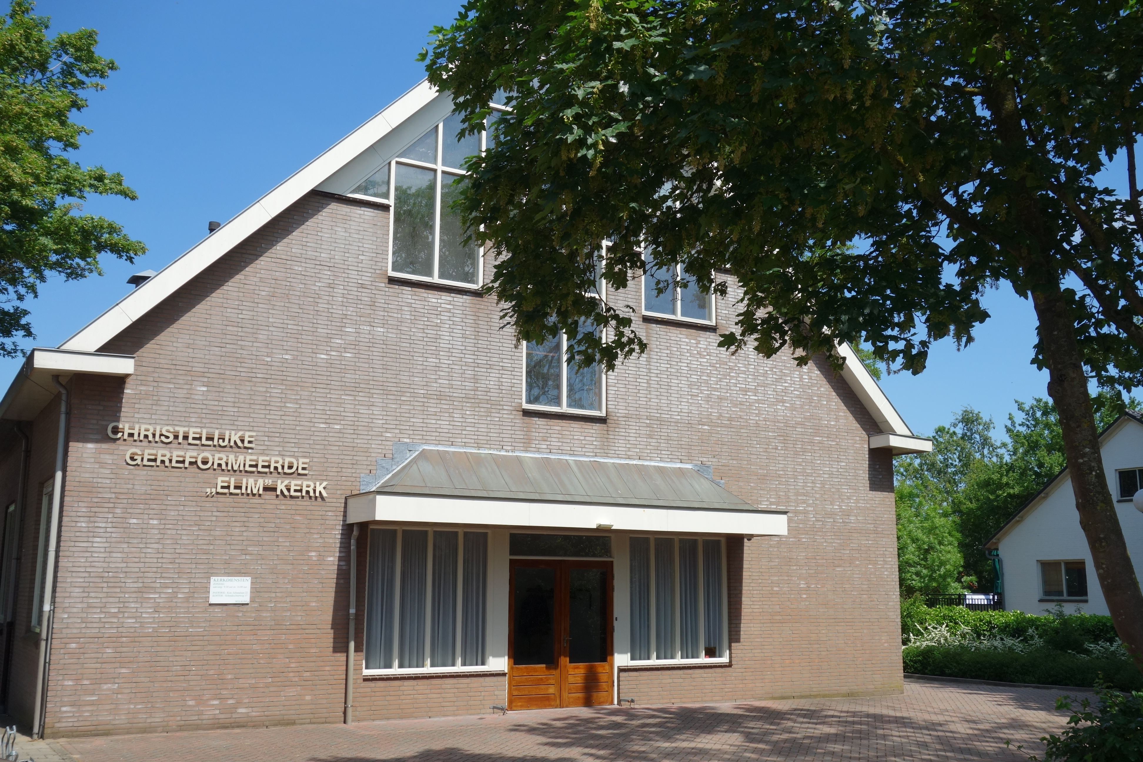 Christelijk Gereformeerde Kerk aan de Koningin Julianalaan in Ouderkerk aan de Amstel. Het gebouw is in 1984 als kerk in gebruik genomen.